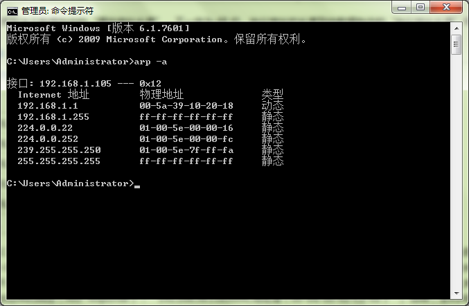 中文（中国大陆）: 在Windows命令行查看ARP缓存表